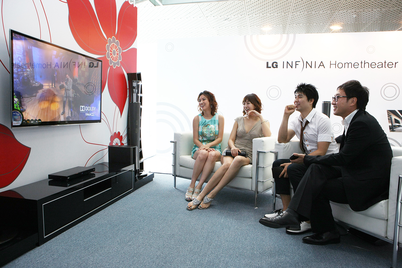 가수 유열, 개그맨 박수홍, 방송인 한영, 김성경 아나운서(우측부터)가 LG 인피니아 홈시어터를 감상하고 있다.